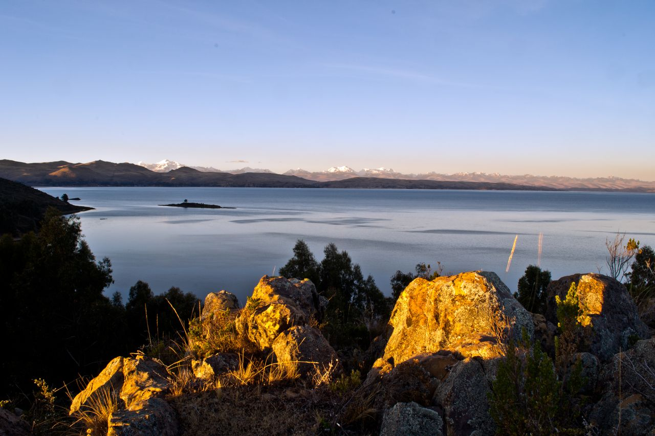 Atardecer Lago Titicaca